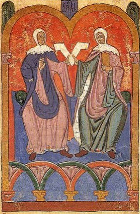 Tereza a Sancha, dcery Bermuda II.